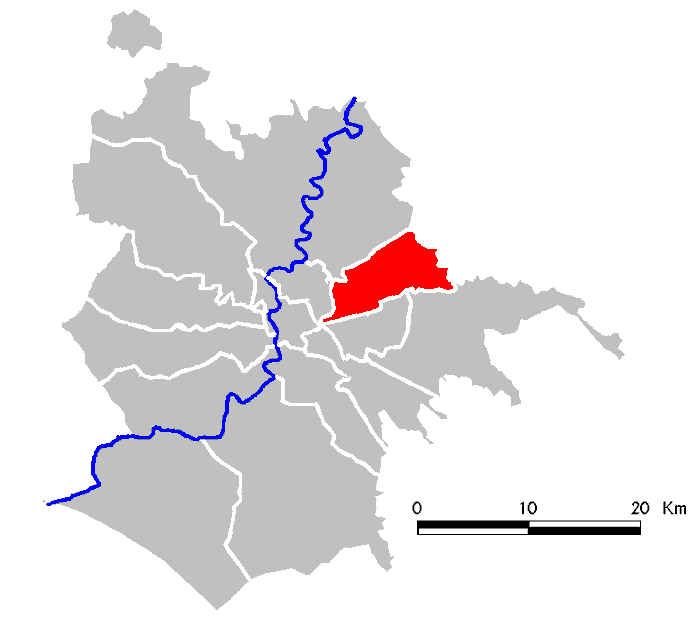 Municipio Roma IV